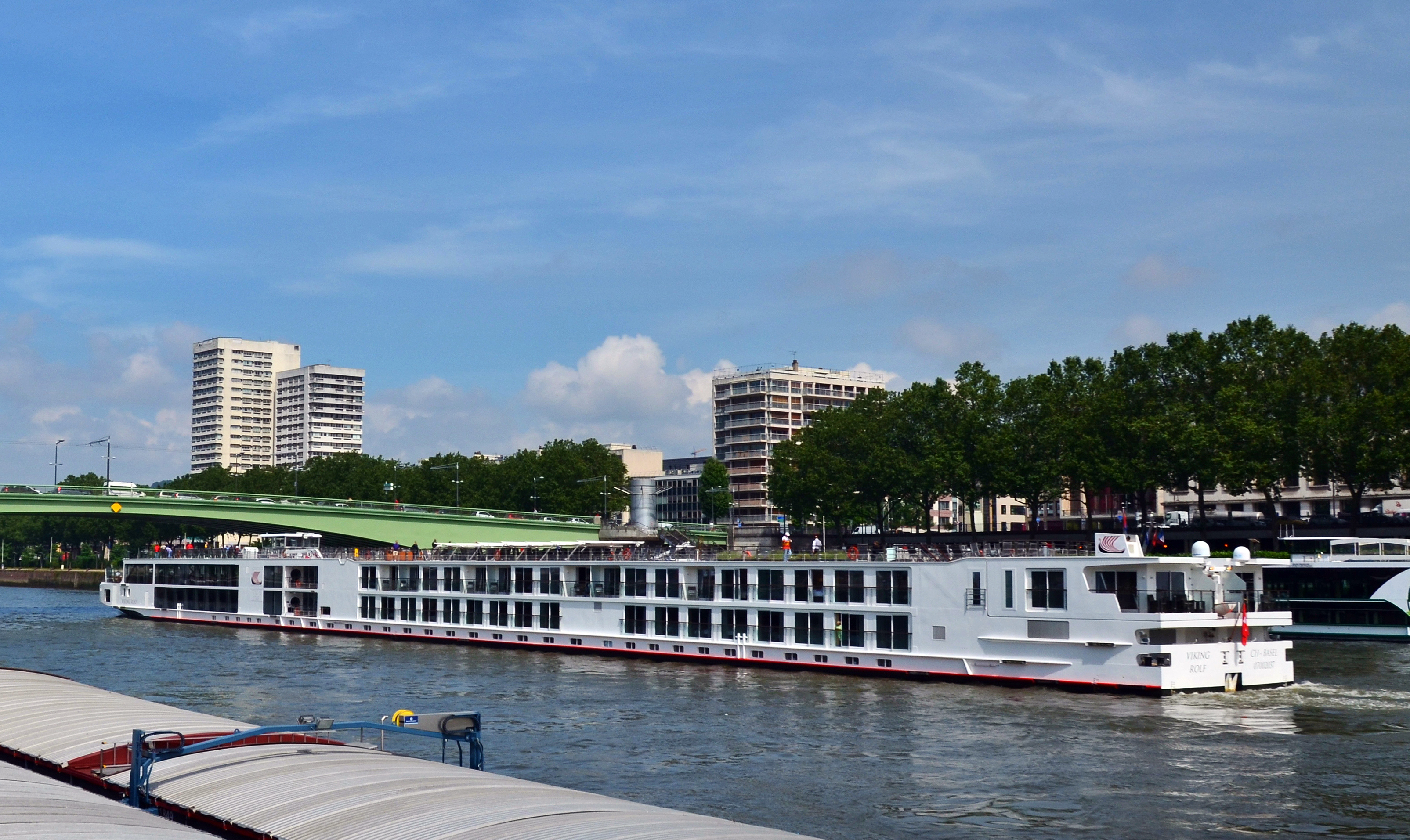 Kabinenfahrgastschiff Viking Rolf auf der Seine bei Rouen.